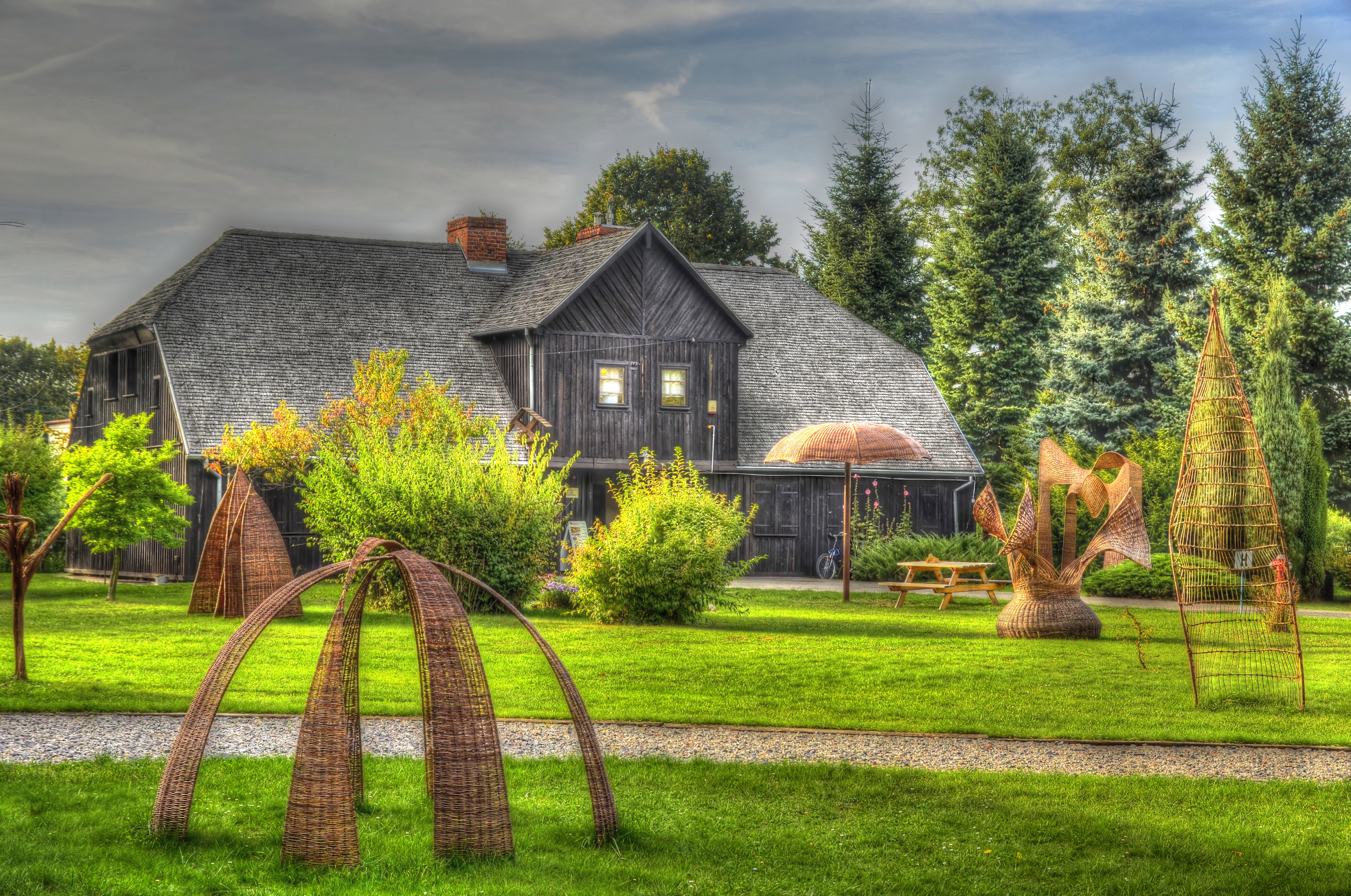 kościół par. pw. MB Nieustającej Pomocy z 1896 r. Nowy Tomyśl, ul. Piłsudskiego 33, Nowy Tomyśl